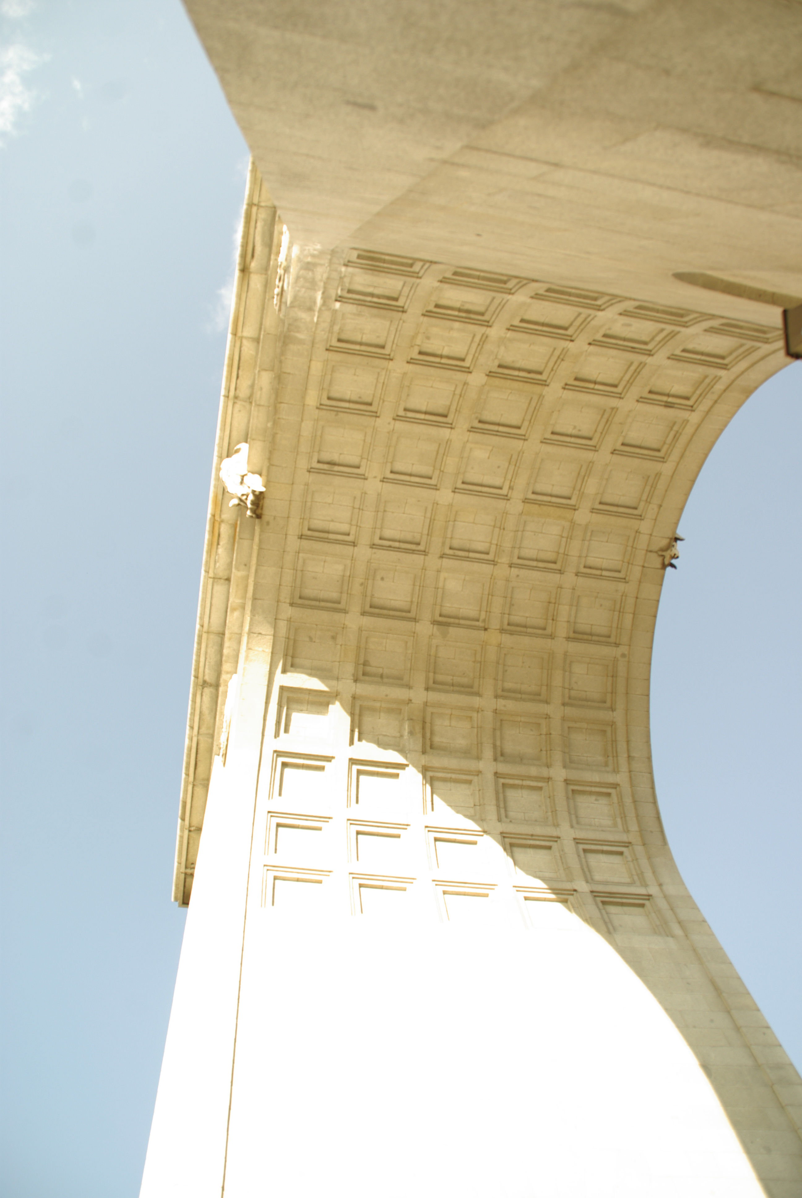 ® S.D. MADRID ARCO DE LA VICTORIA